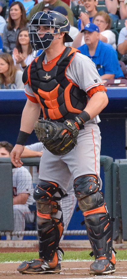 Tyler Heineman